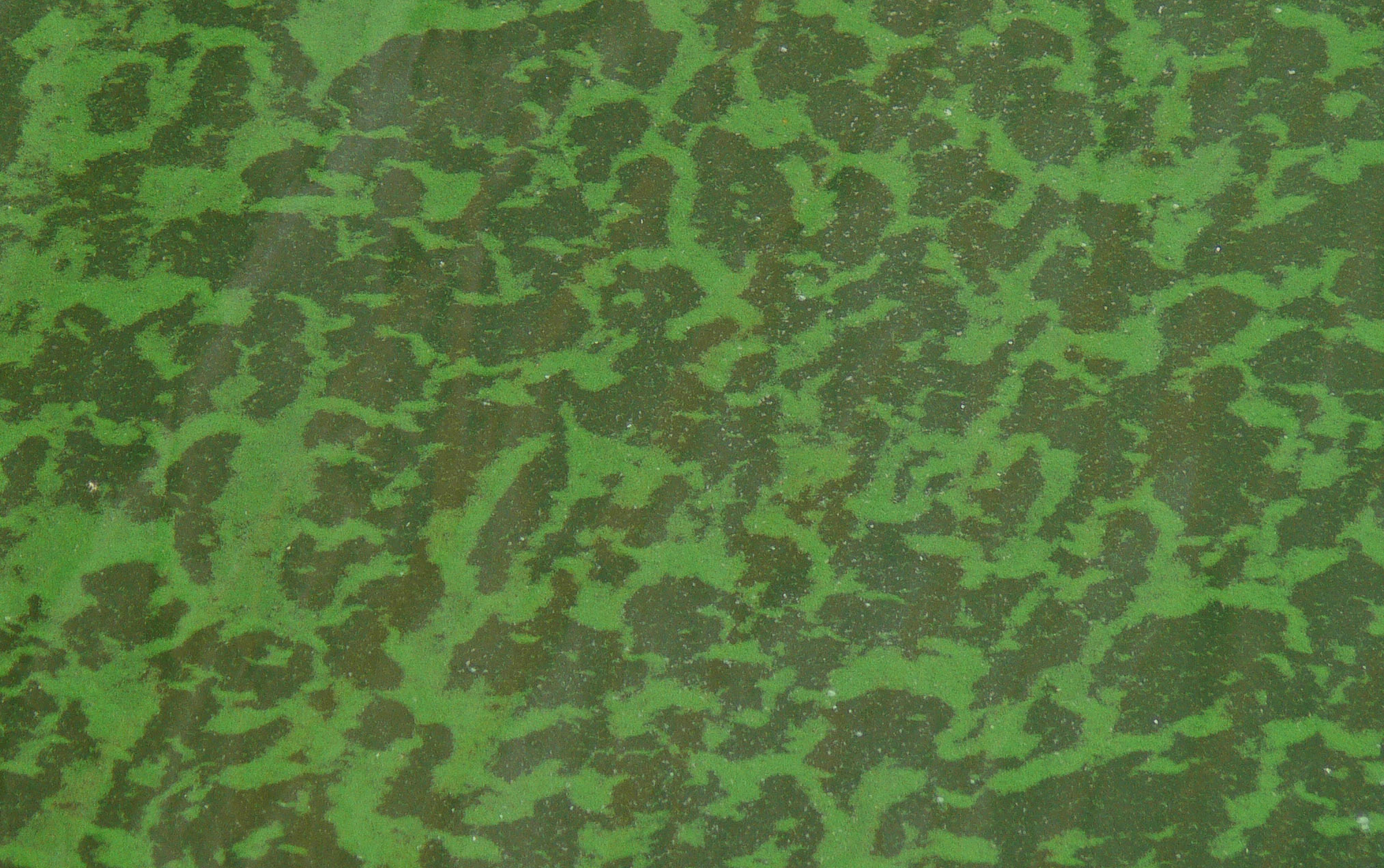 Inflorescence planctonique. Ce sont a priori des cyanophycées (algue bleue). Au début de l'épisode, près des berges ou là où le vent en provoque des accumulation, on distingue des taches vertes. Lieu : quai du Vault à Lille, après une longue période pluvieuse. Le canal proche est également couvert d’une couche de plancton vert, moins épaisse.